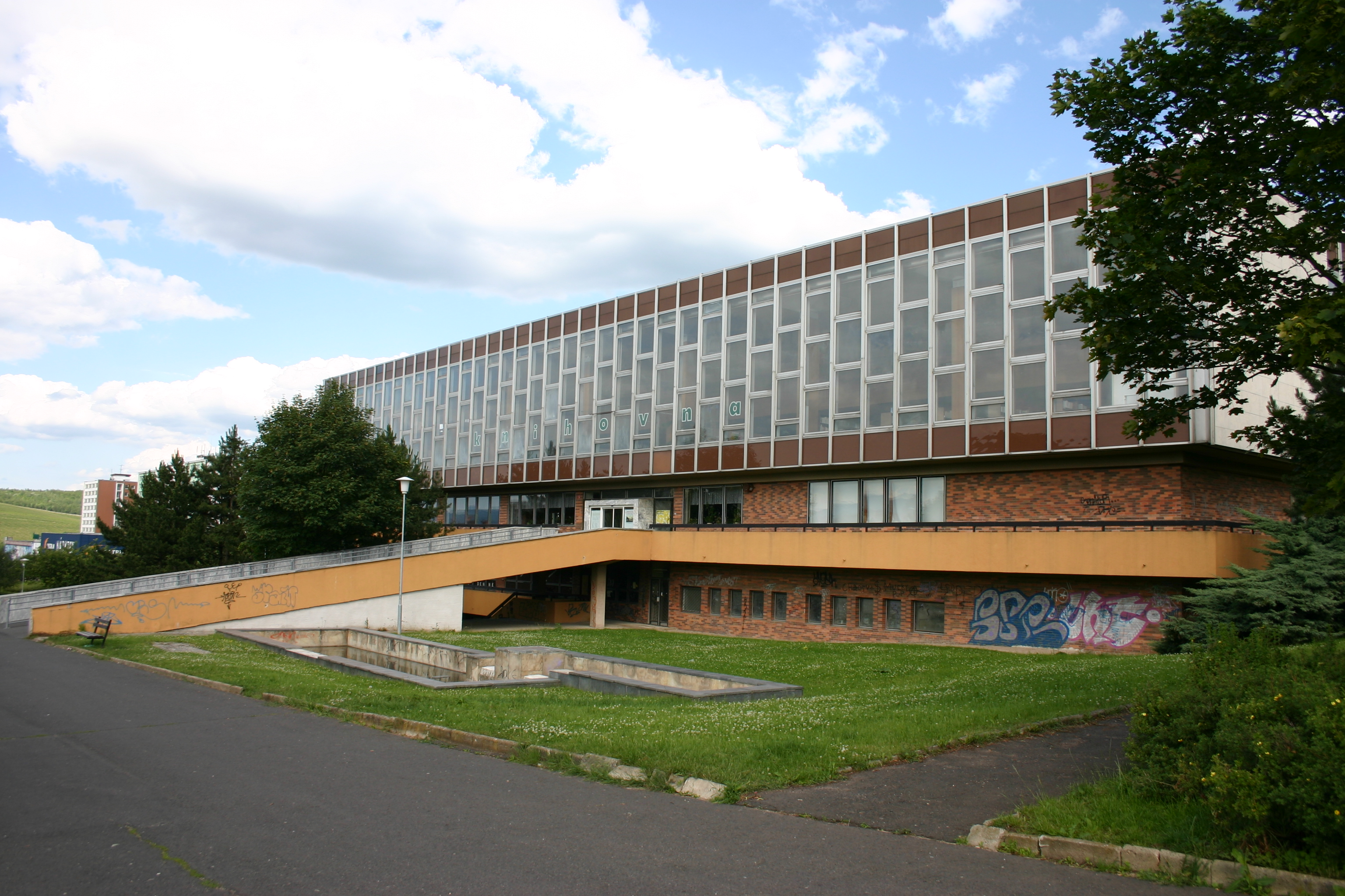 Městská knihovna v Mostě